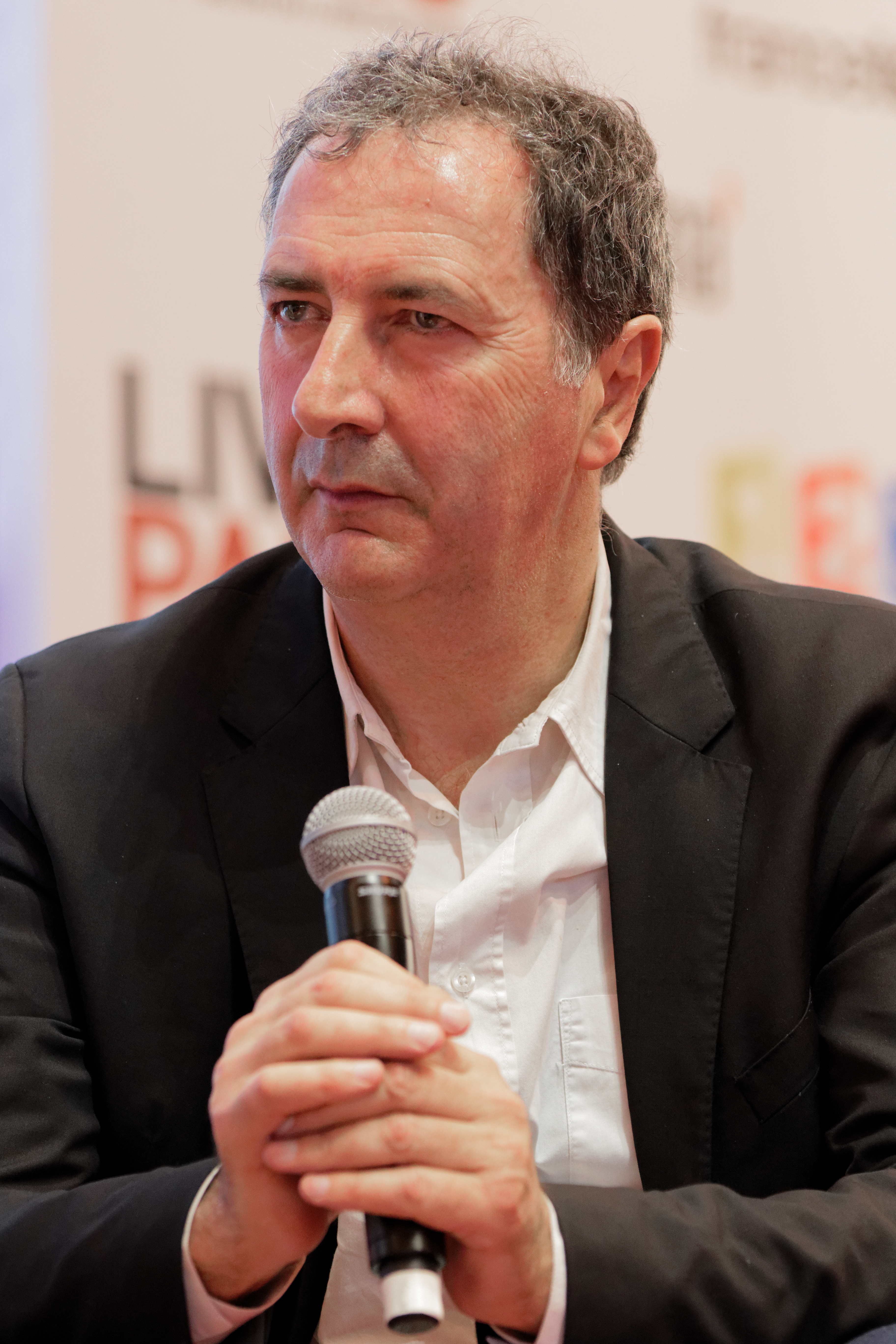 François Morel en conférence lors du salon du livre de Paris 2017.